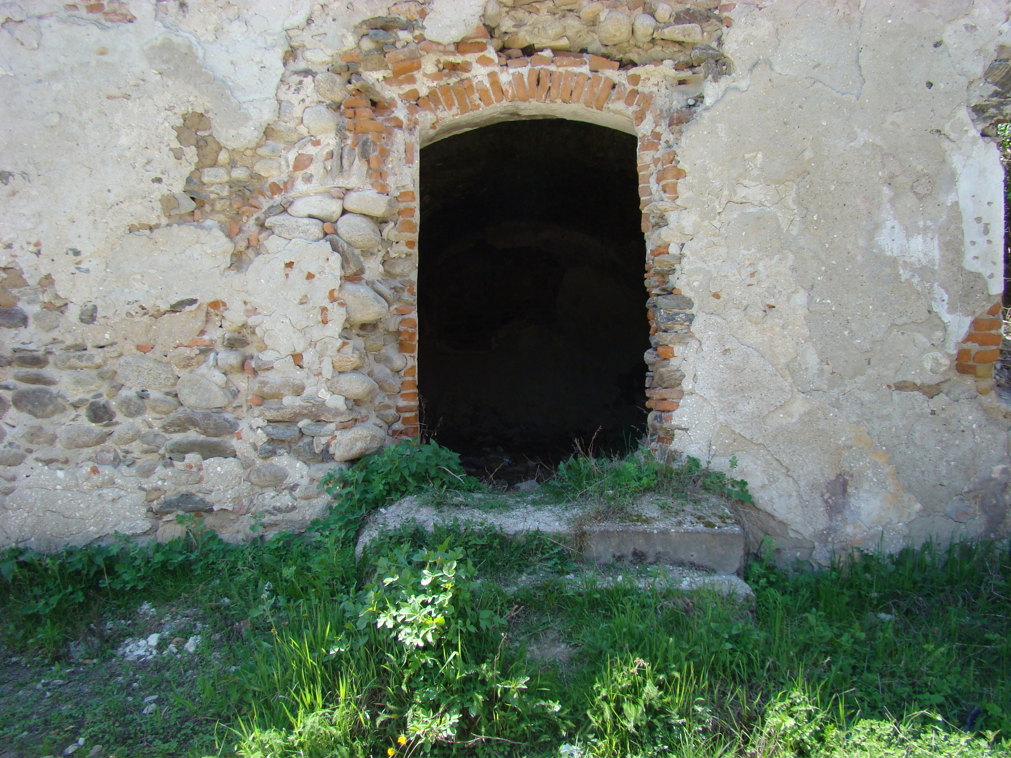 Curtea nobiliară a Cândeştilor, sat RÂU DE MORI; comuna RÂU DE MORI